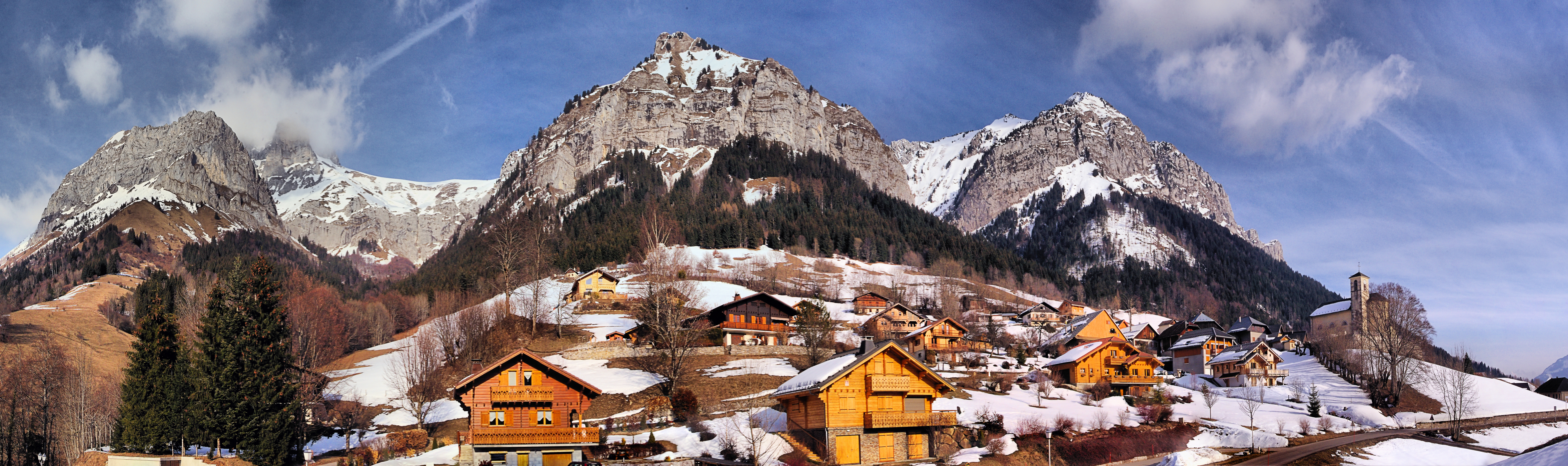 Panorama de Montmin en 2012